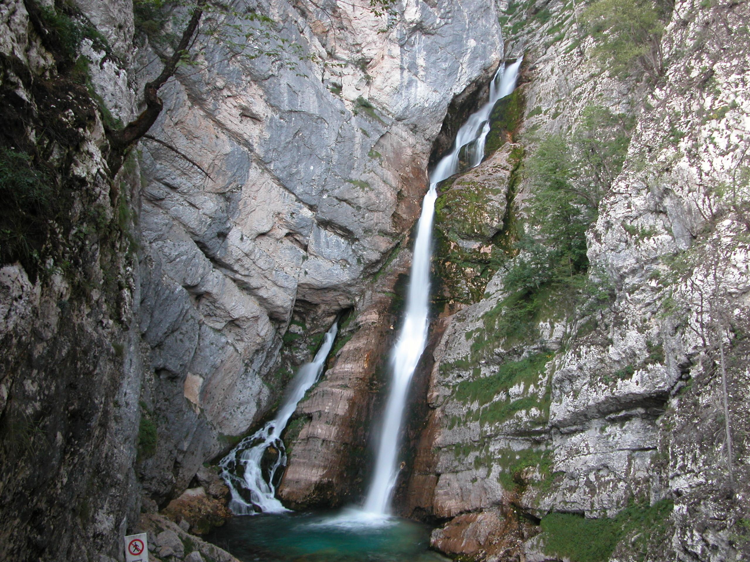 Savica waterfall near Bohinj lake, Slovenia photo:Ziga 12:01, 16 April 2007 (UTC)